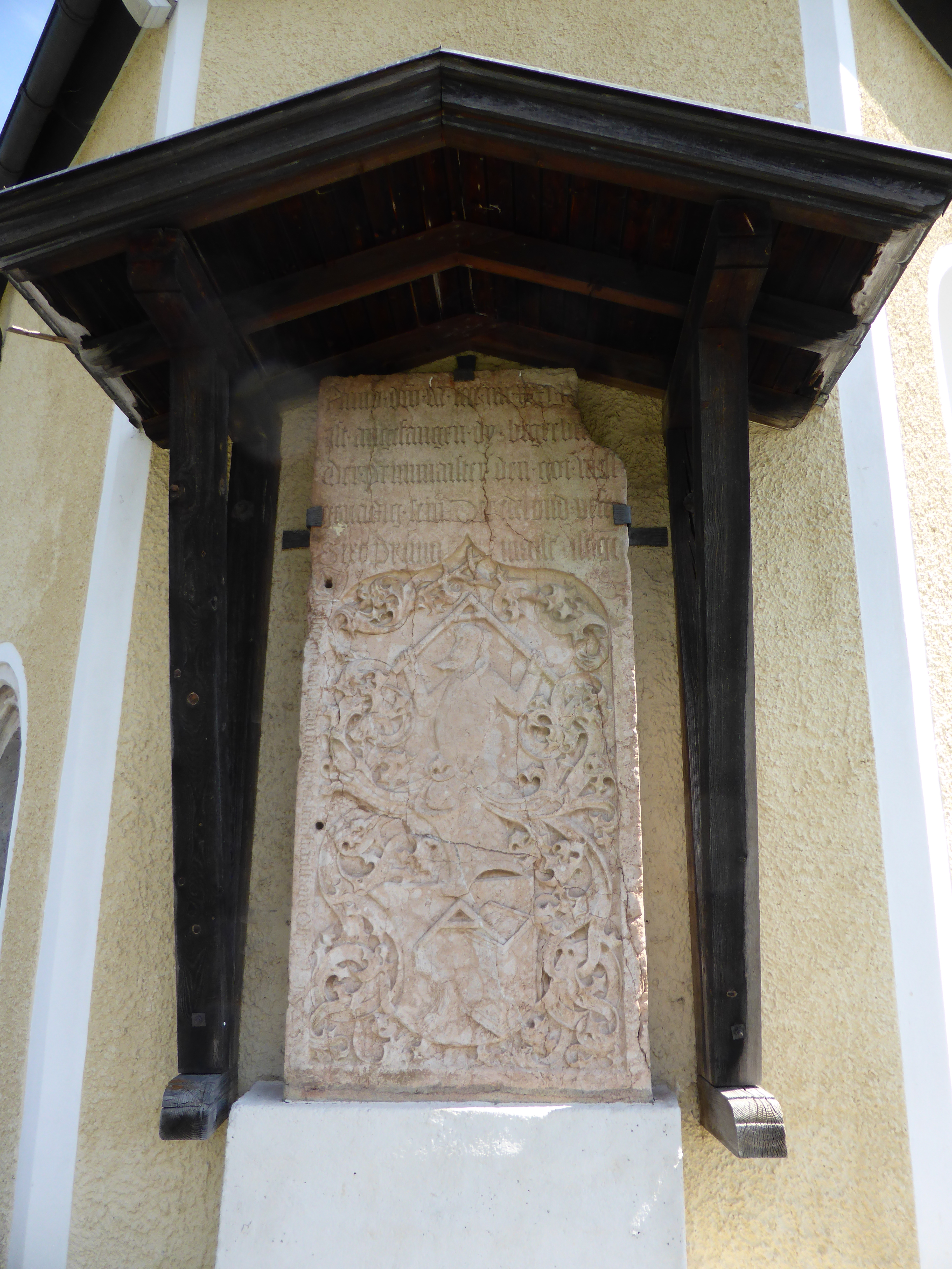 Kath. Pfarrkirche hl. Vitus-14